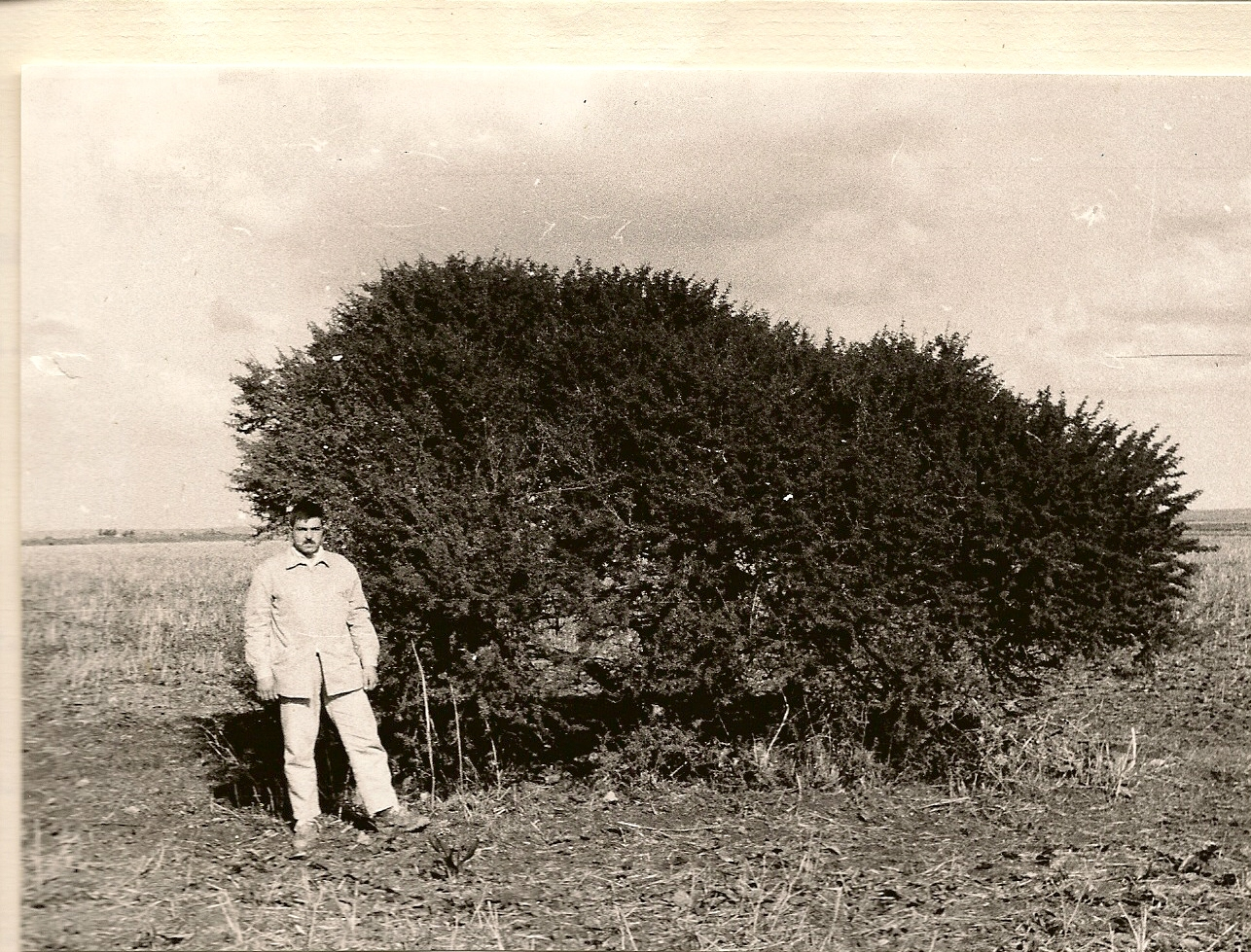 Un bel exemplaire situé dans la vallée de l'Oued Mellah, 1km au Nord de sidi-Abelah-el-Jebaar. Un bel arbre d'Acacia gummifera talh bleddi.